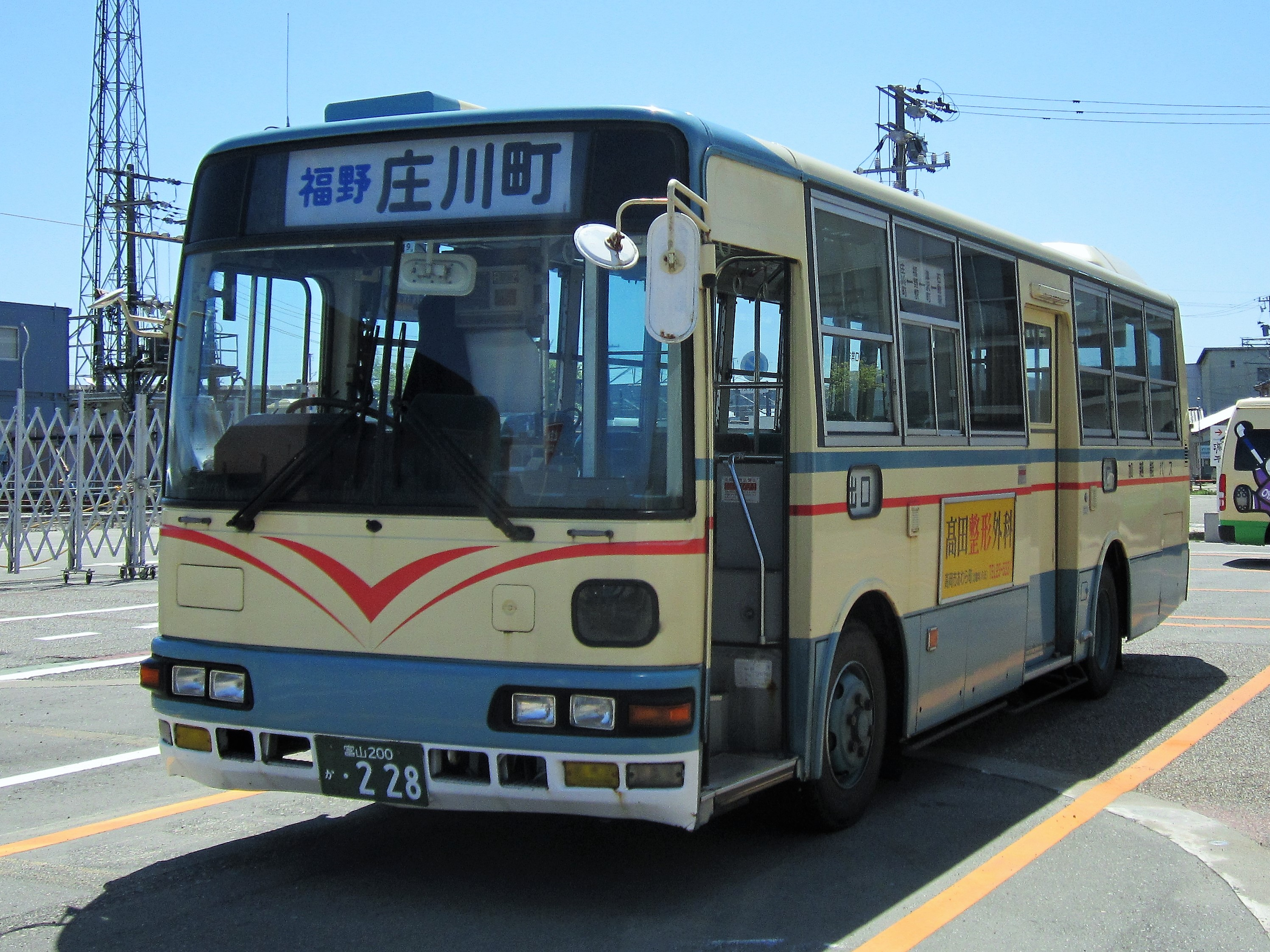 石動駅前に停車中の加越能バス Canon PowerShot A2200